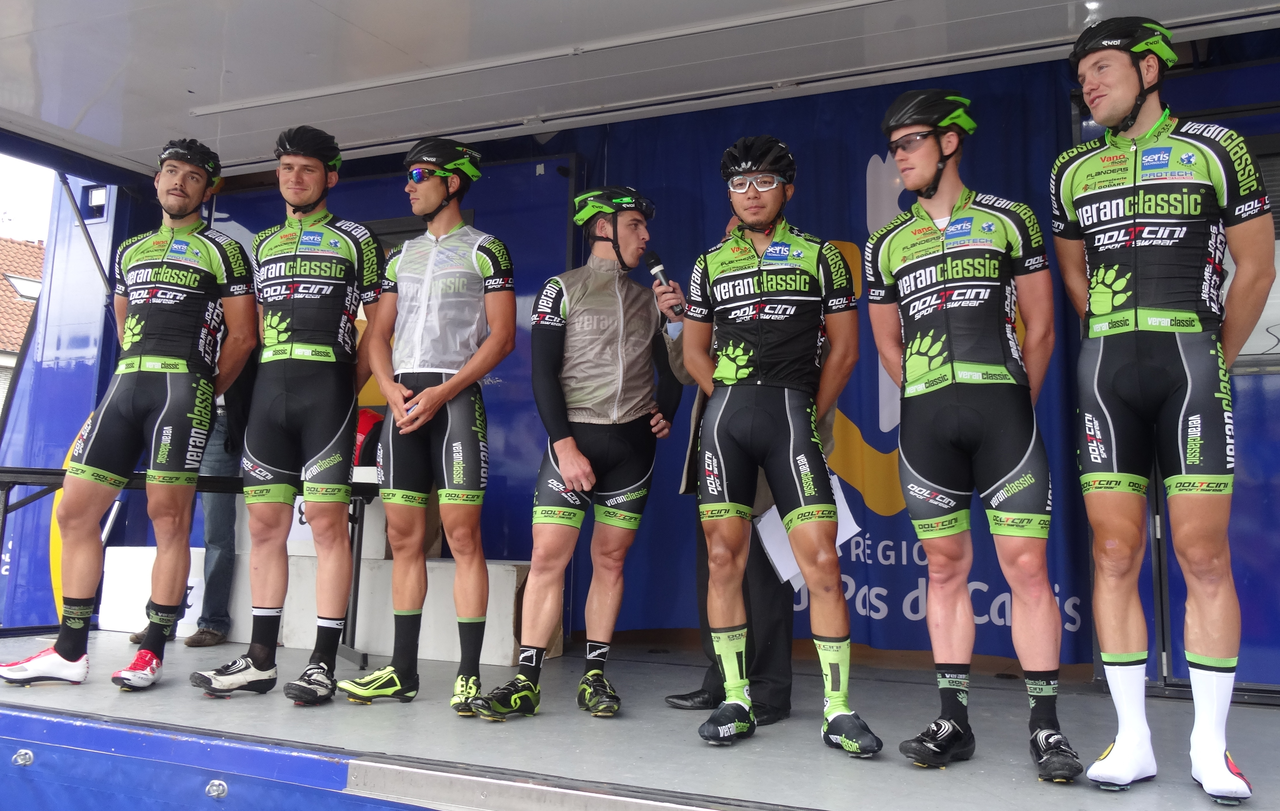 Reportage photographique réalisé le dimanche 13 juillet à l'occasion du départ et de l'arrivée de la Ronde pévéloise 2014 à Pont-à-Marcq, Nord-Pas-de-Calais, France.